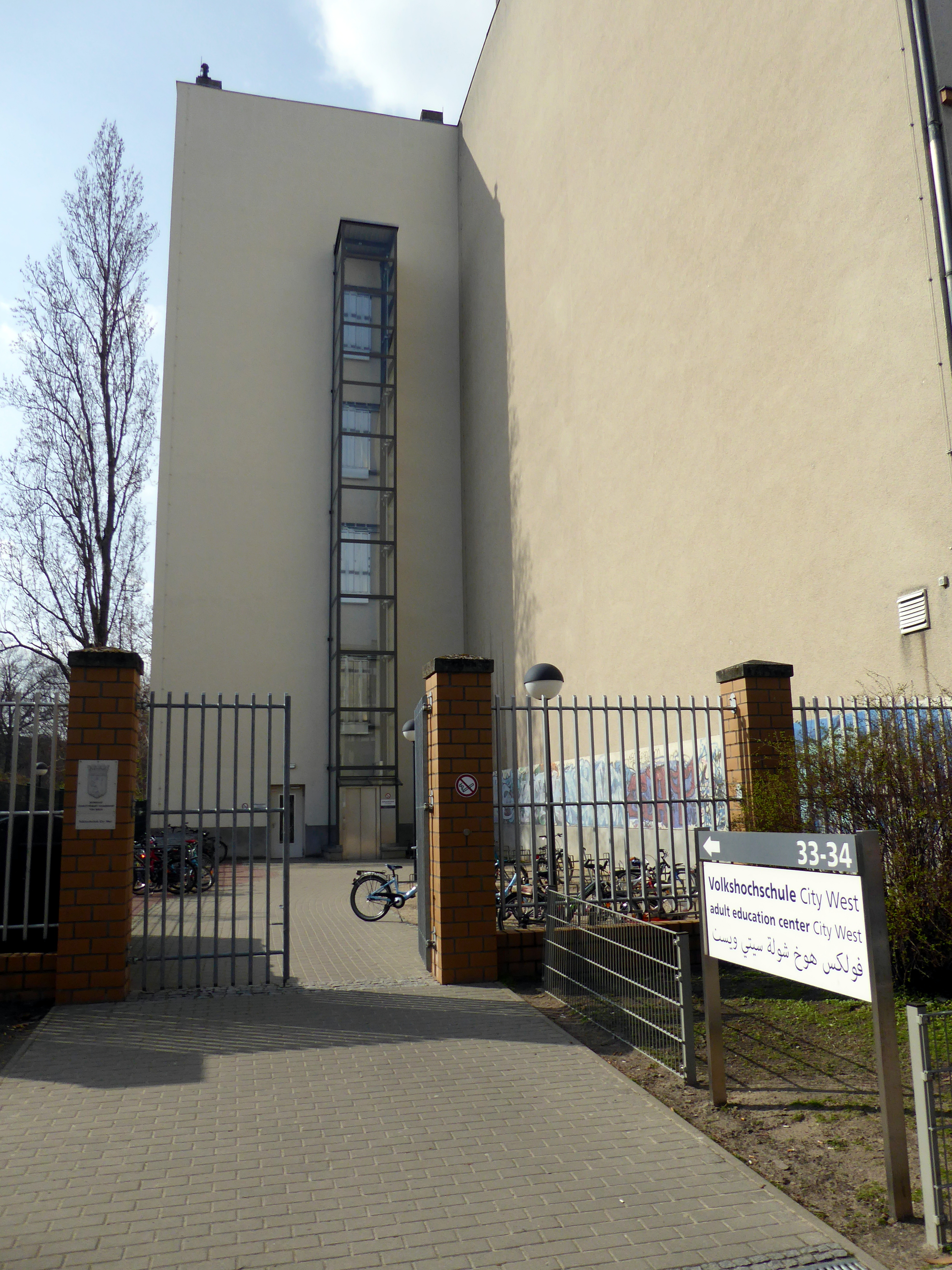 Wilmersdorf Prinzregentenstraße Eingang zur Volkshochschule City